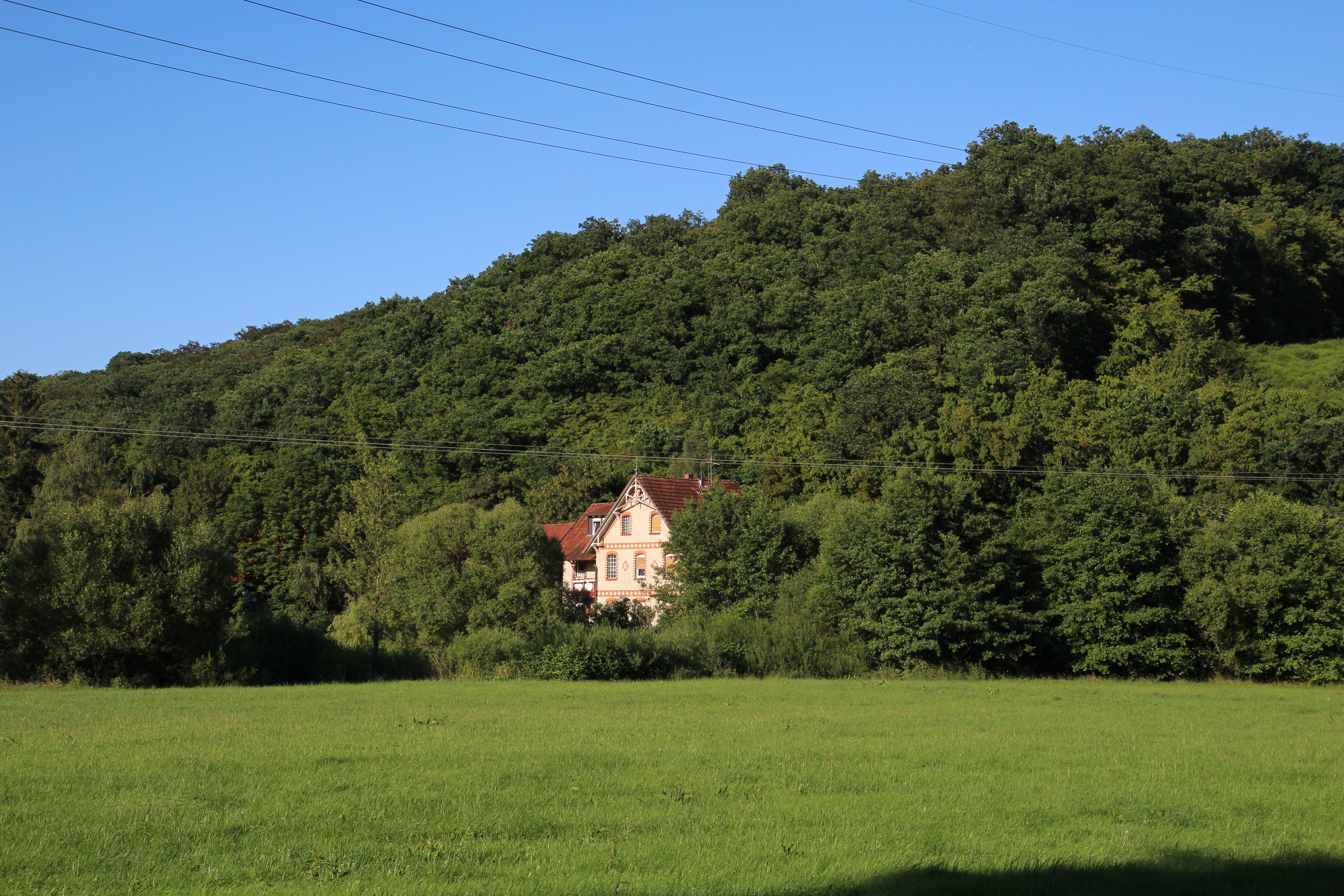 Siehe Bild und Dateiname